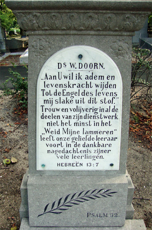 Ds Willem Doorn graf, foto genomen op begraafplaats Oud Eik en Duinen, te 's-Gravenhage.